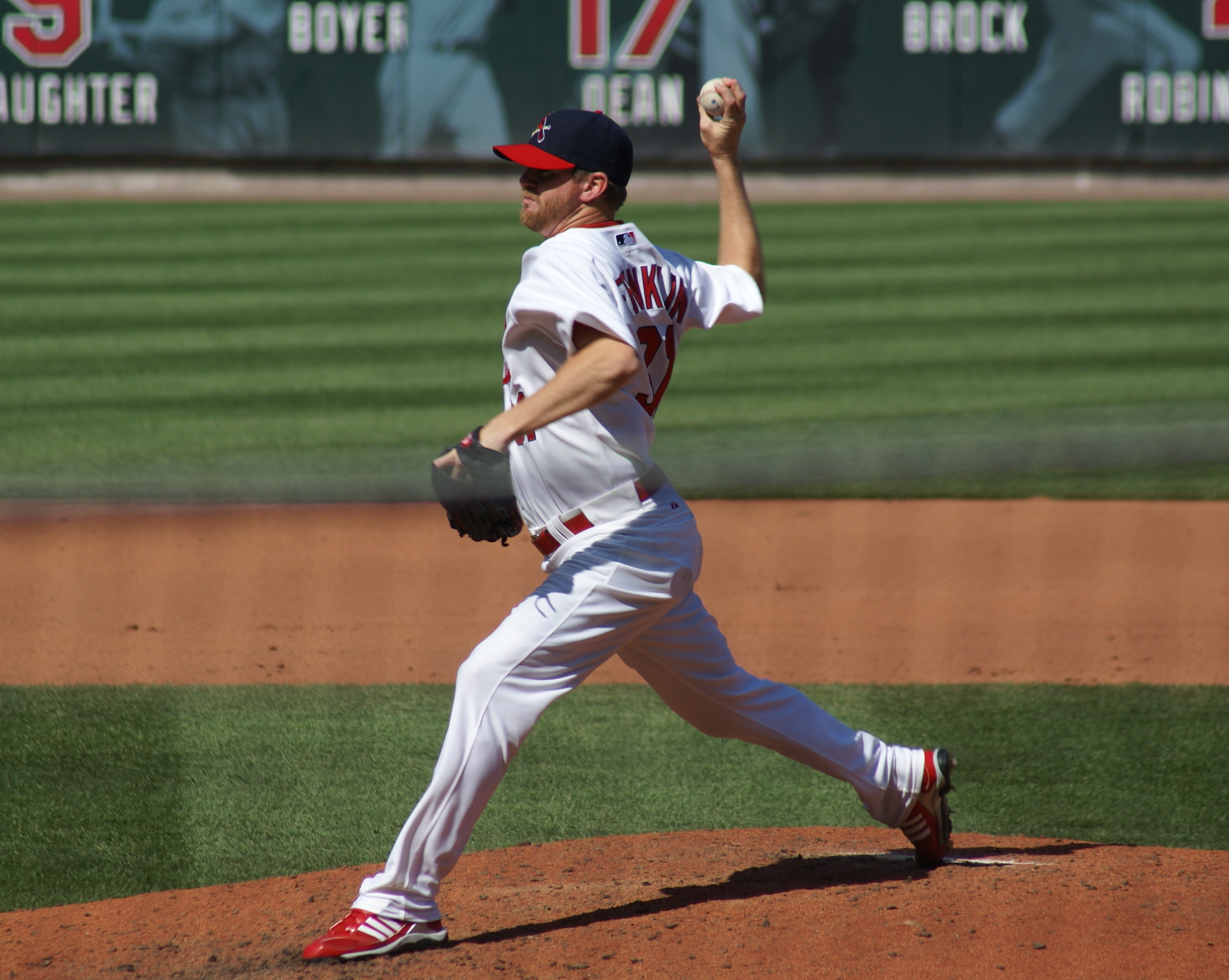 Ryan Franklin